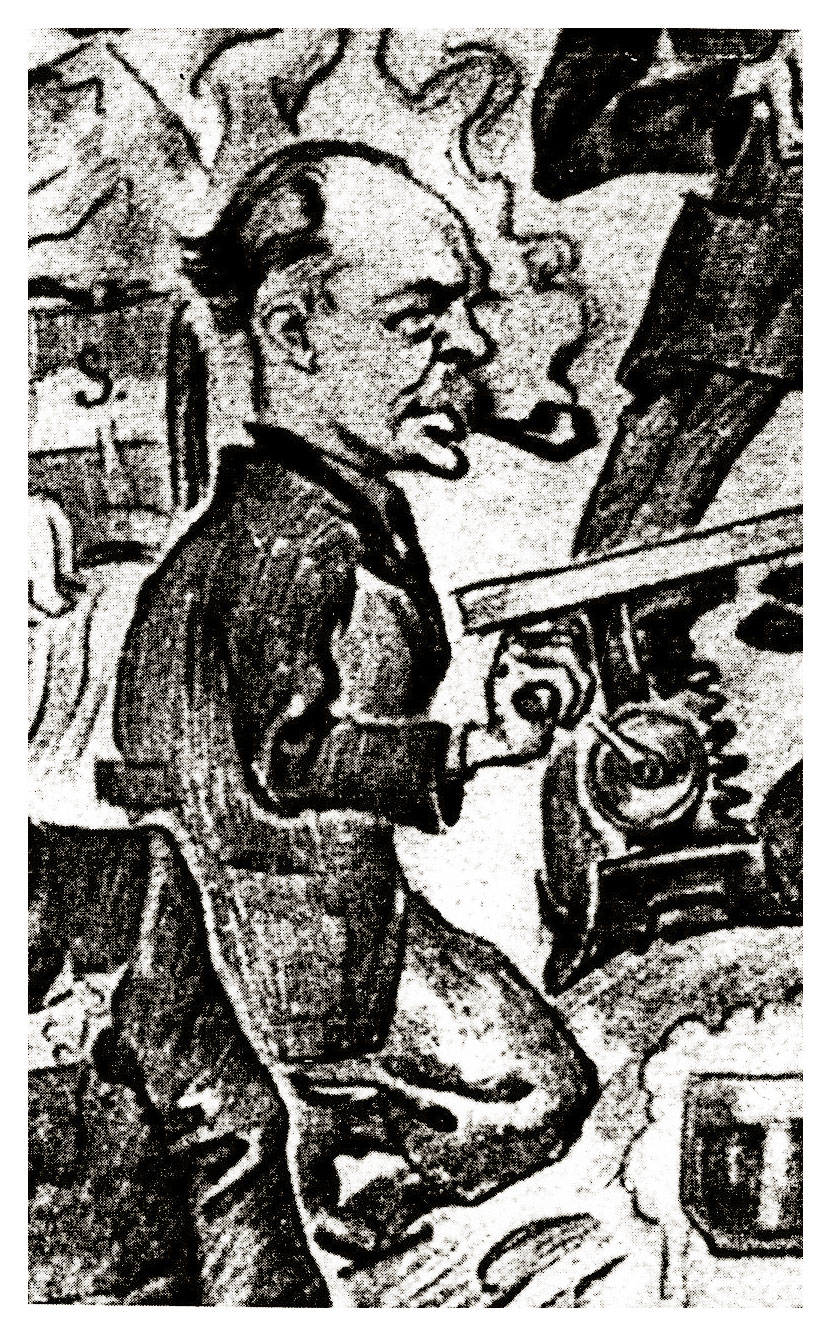 Doc. inż. Józef Ostaszewski (1904-1989), "Wiek Nafty" nr 4 / 1999 r.